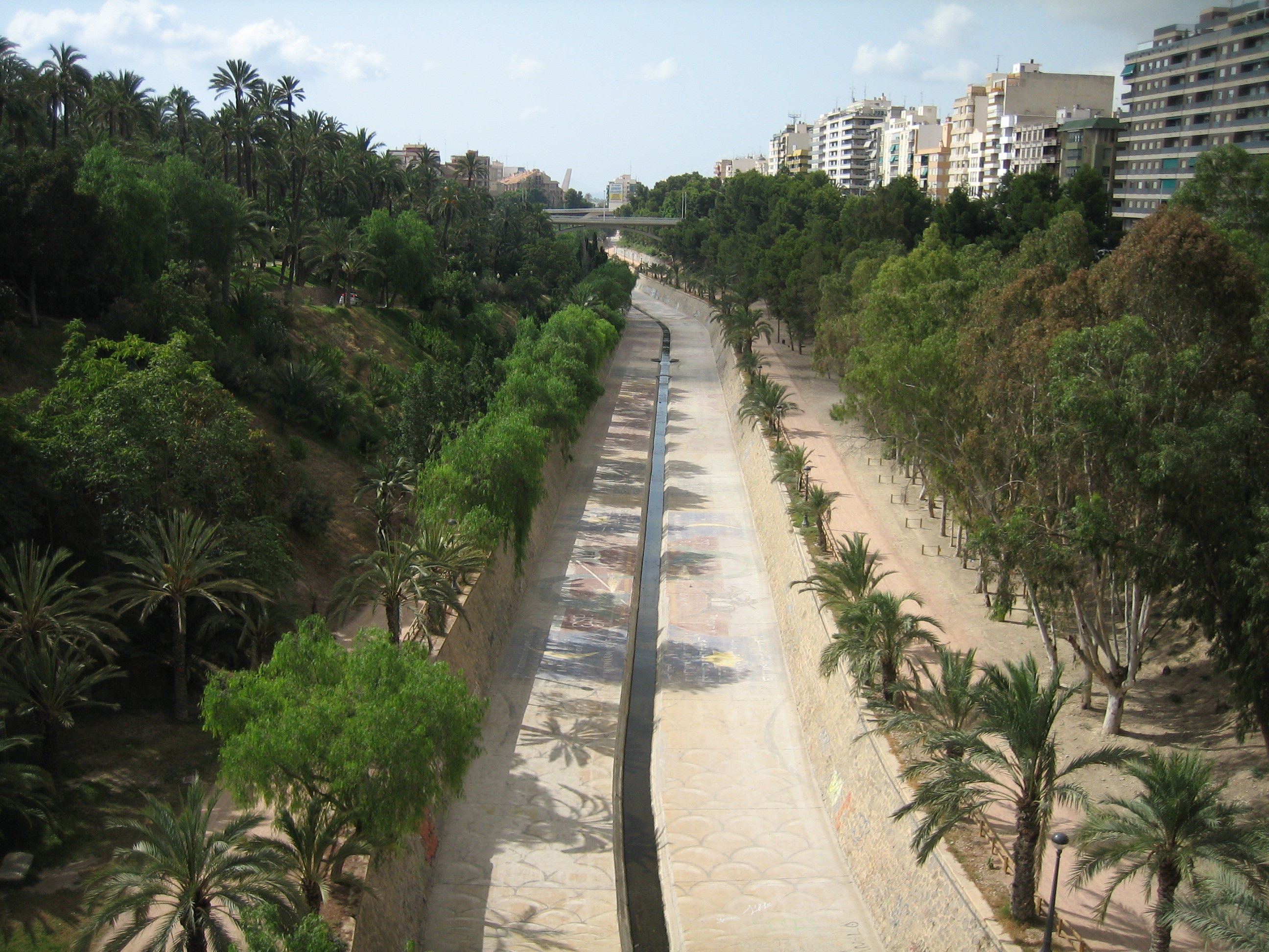 Río Vinalopó a su paso por Elche, Alicante, España. Desde el puente de la Avenida del Ferrocarril.